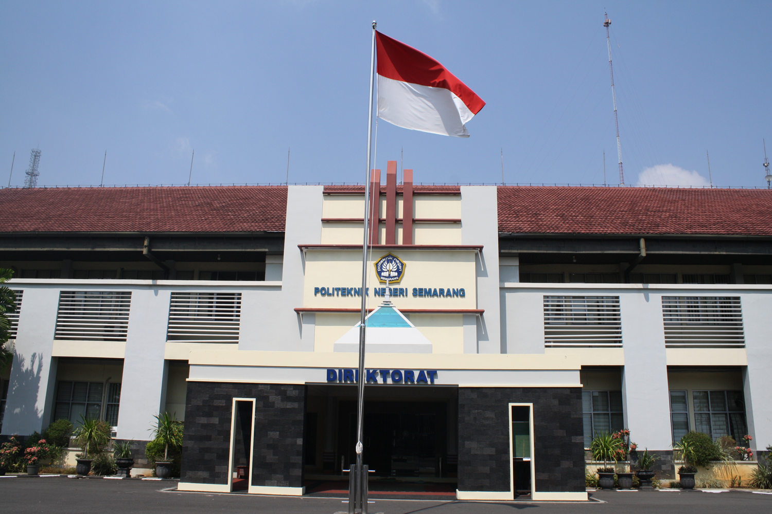 Politeknik Negeri Semarang yang terletak di desa Tembalang Jawa Tengah Indonesia